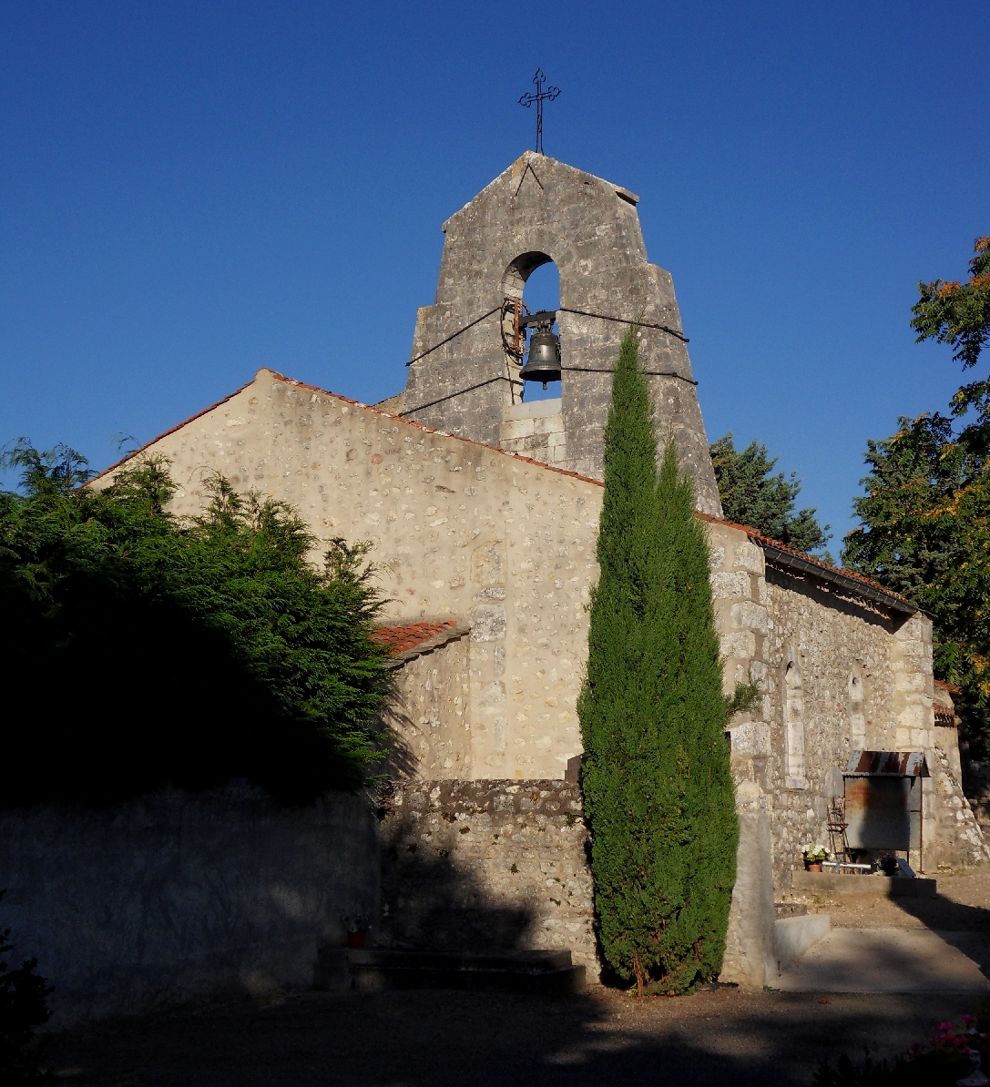 Église Saint-André, (Inscrit, 1968) .